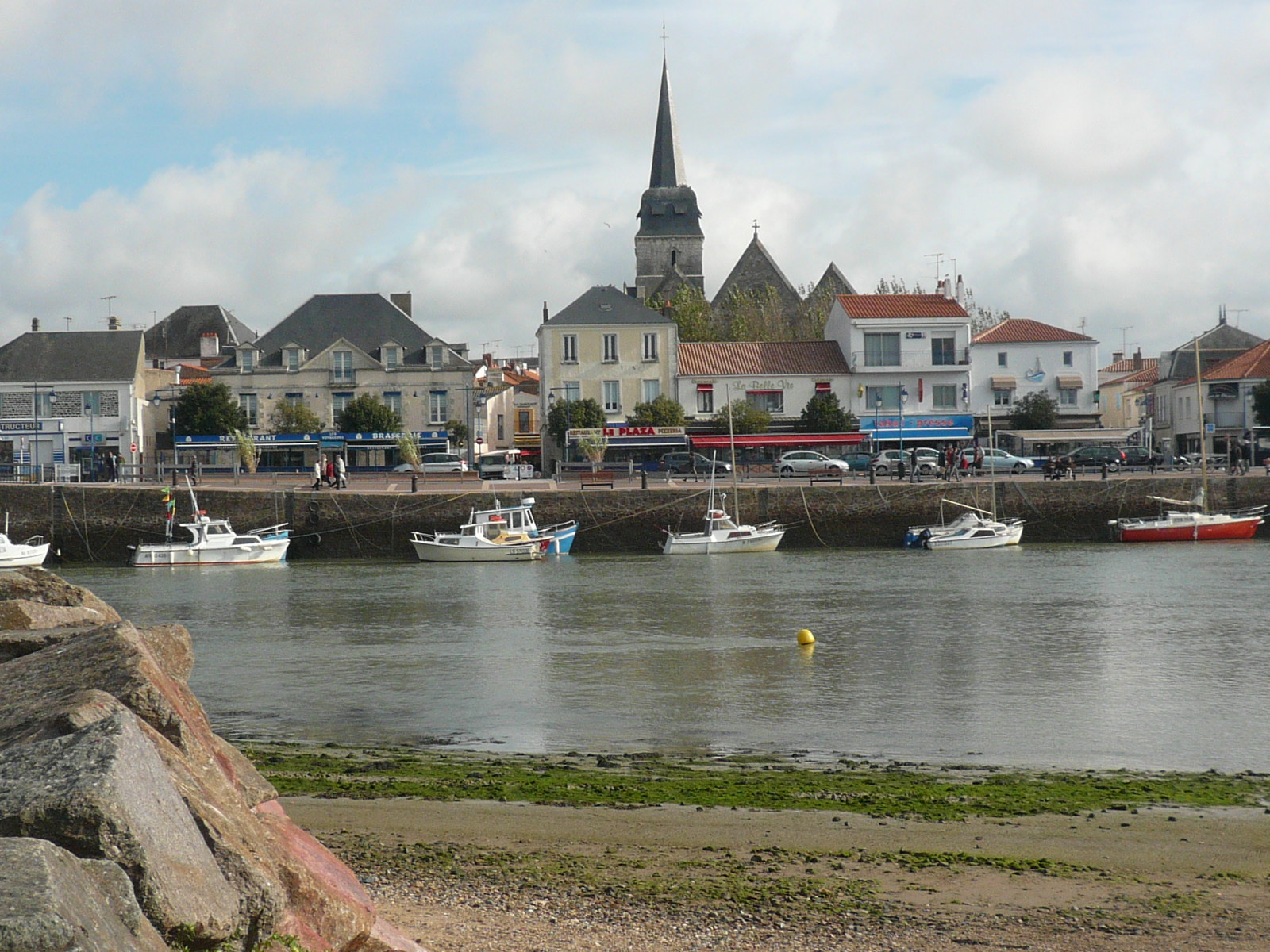 Saint-Gilles-Croix-de-Vie dans le département de la Vendée (France) : Saint-Gilles et le quai du port Fidèle vu depuis l'autre côté de la Vie au niveau du square Benjamin Beneteau en octobre 2008.